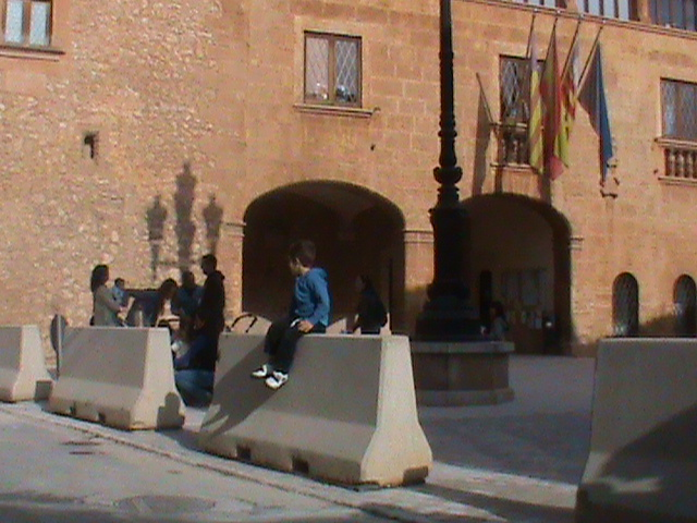 És l'ajuntament del poble de Campos amb el nou enrajolat de la plaça Major